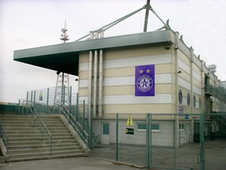 Franz-Horr-Stadion bei Schlechtwetter, 2008